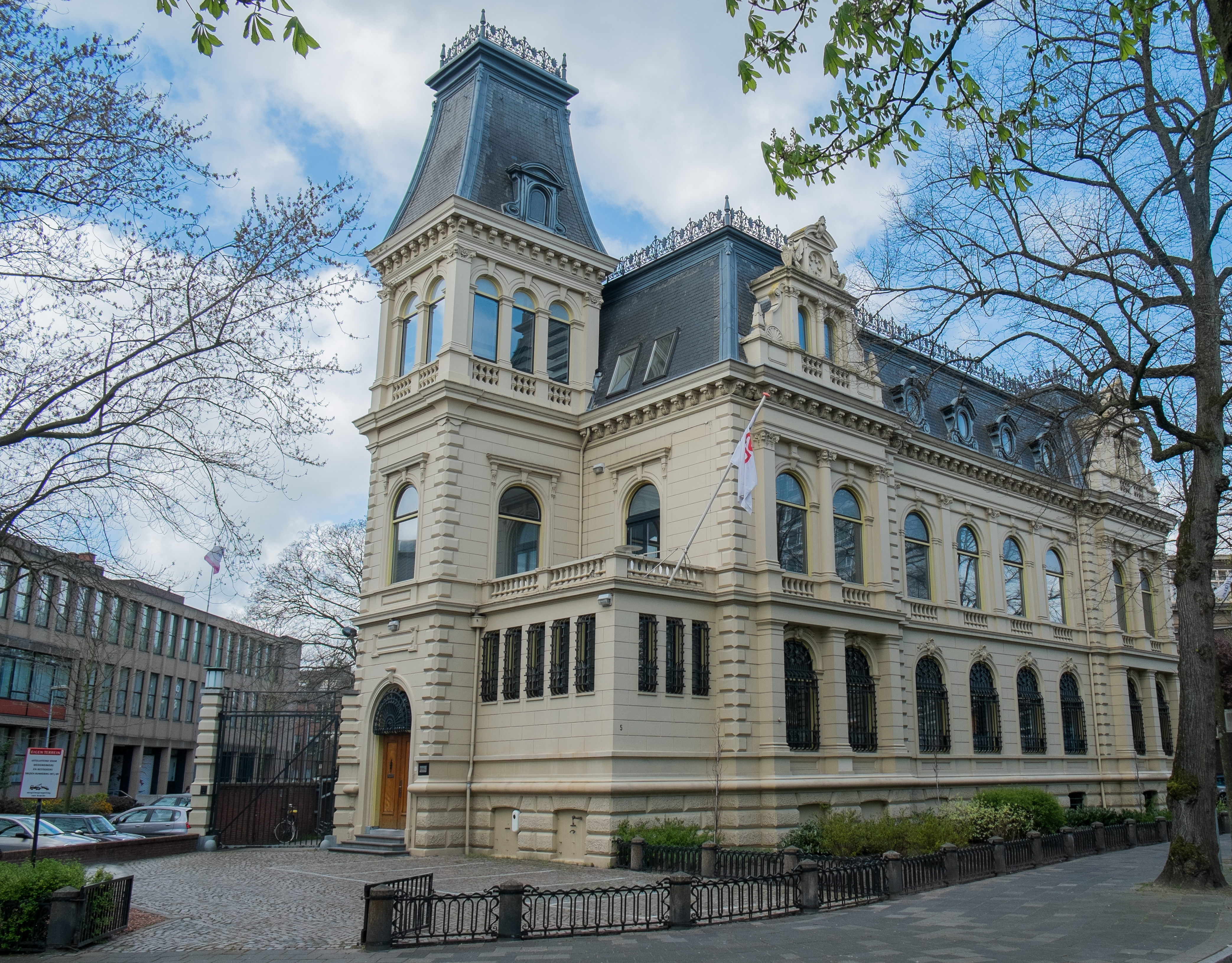 Villa van Van Panhuys. Gebouwd in 1881 in opdracht van Johan Æmilius Abraham van Panhuys naar ontwerp van Gerhard Schnitger in de stijl van de Loire-kastelen. Tussen 1923 en 1992 was er een filiaal van De Nederlandsche Bank gevestigd.